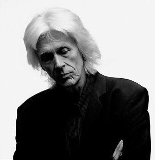 Rikkert Zuiderveld (Groningen, 5 februari 1947) is een Nederlands zanger en schrijver die samen met Elly Nieman het duo Elly en Rikkert vormt. Samen hebben ze vele albums met kinderliedjes en (vaak op het christelijk geloof georiënteerde) luisterliedjes uitgebracht. Rikkert is tevens auteur van een aantal boeken en gedichten.